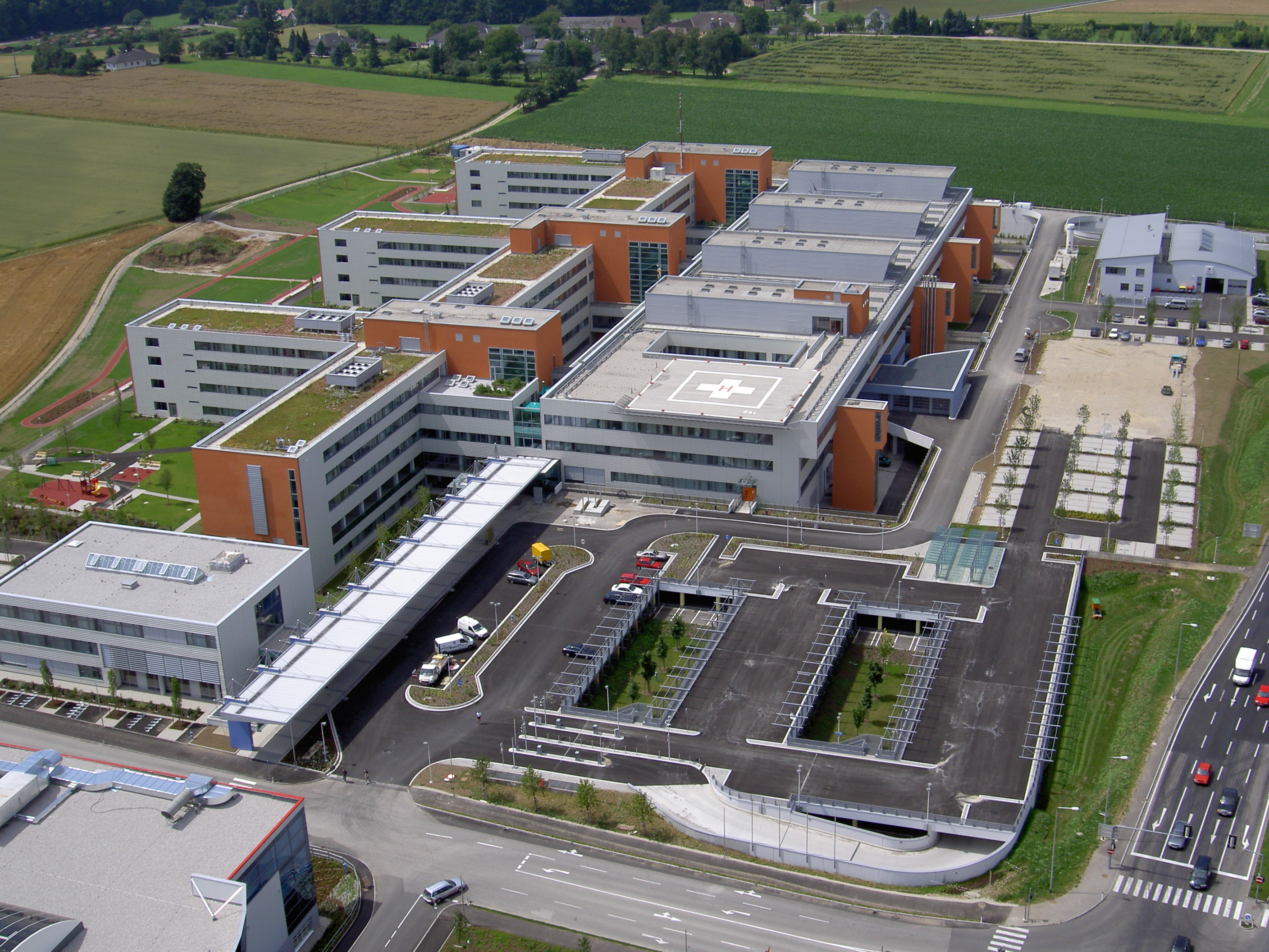 Aussenansicht des Landeskrankenhauses Vöcklabruck (das auch ein PPP-Modell der VAMED ist)